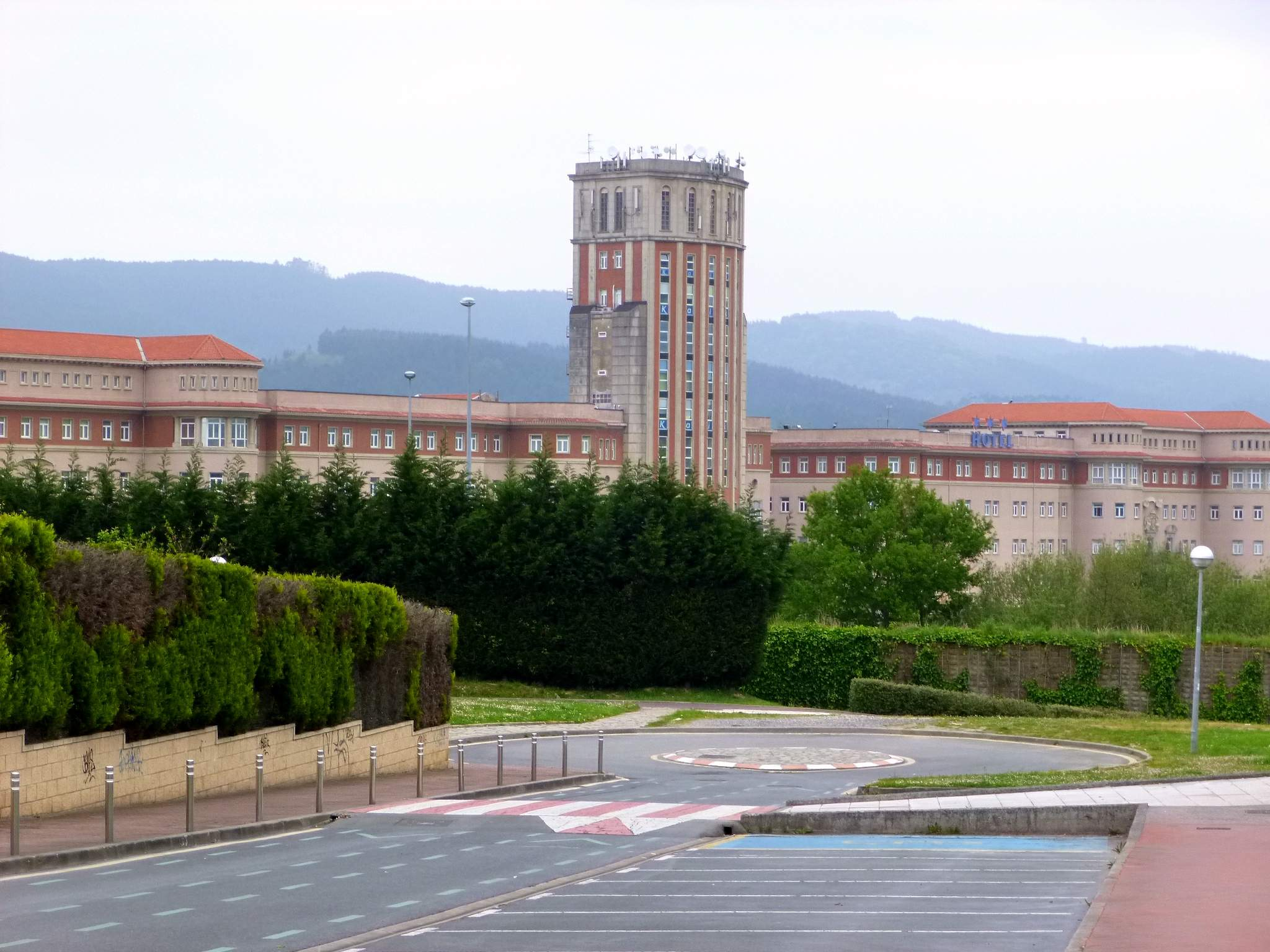 Antiguo Seminario de Derio (Bizkaia)